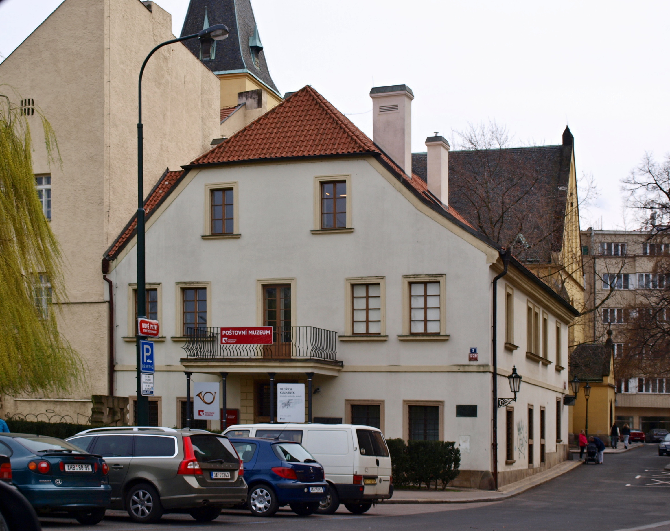 Poštovní muzeum Praha